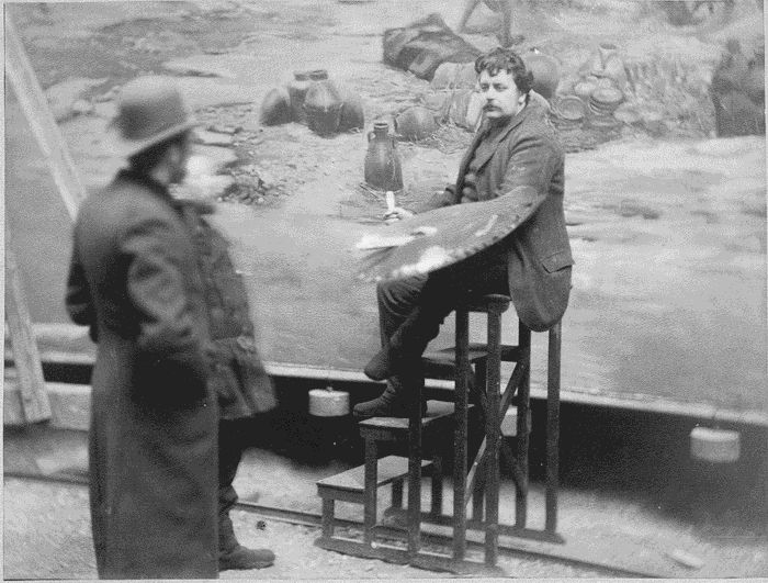 Auftraggeber des Panoramas, Joseph Halder, bei Bruno Piglhein am Panorama im eigens hierfür errichteten Panoramagebäude an der Goethe-Straße 45 in München.